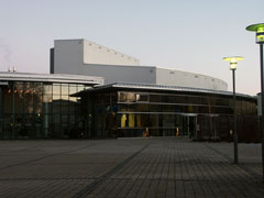 Haus der Kultur in Waldkraiburg